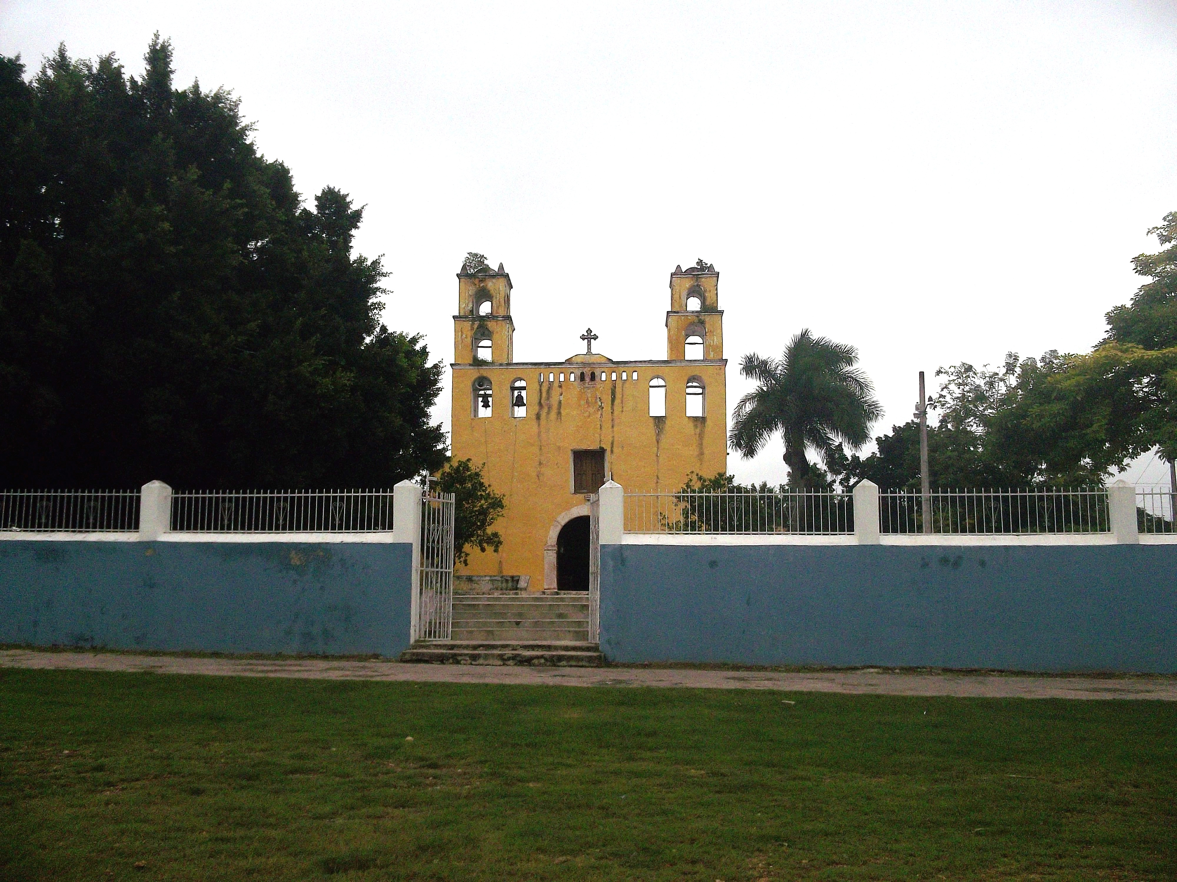 Iglesia de Huhí, Yucatán.